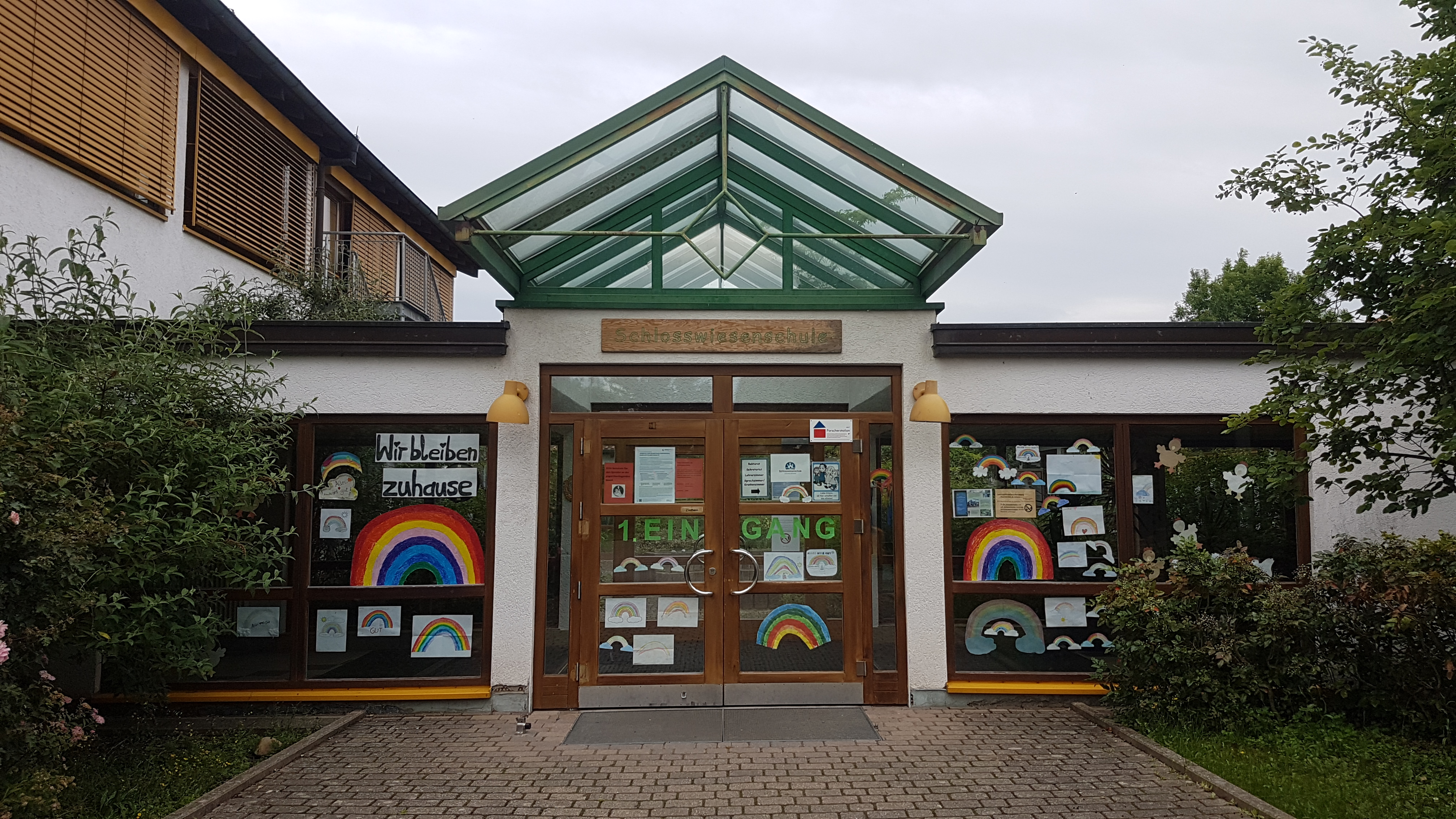 Eingang der Schlosswiesenschule Eschelbronn während der Covid-19-Pandemie 2020